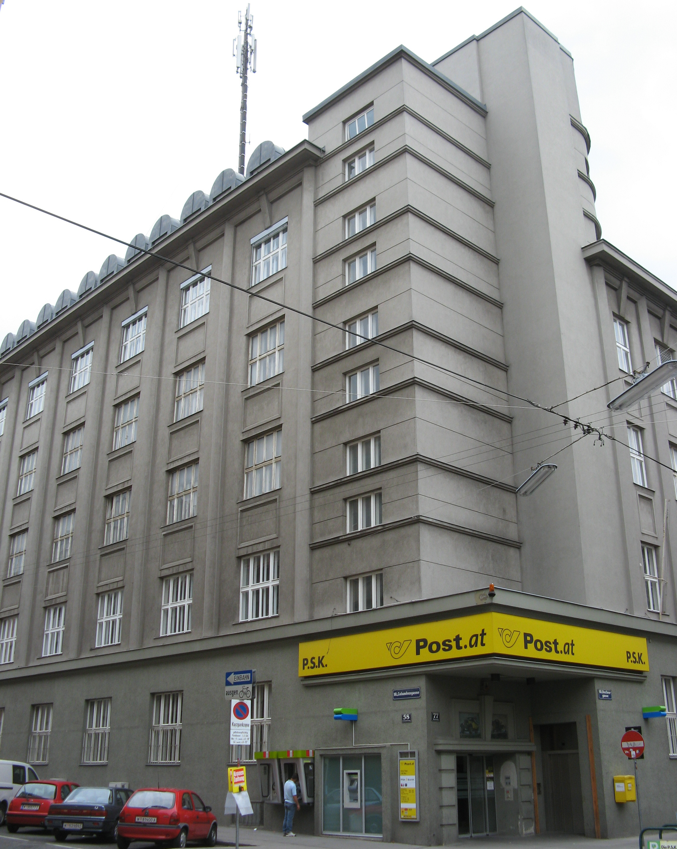 Postamt (1928/29) von J. Aicher und A. Gerger, Buchengasse 77, Wien-Favoriten